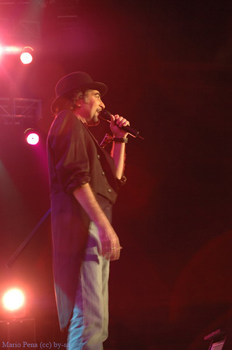 Joaquín Sabina en concierto //Joaquin Sabina in concert